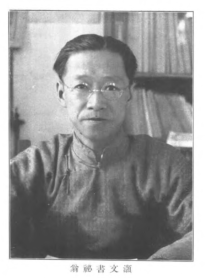 翁秘書文灝